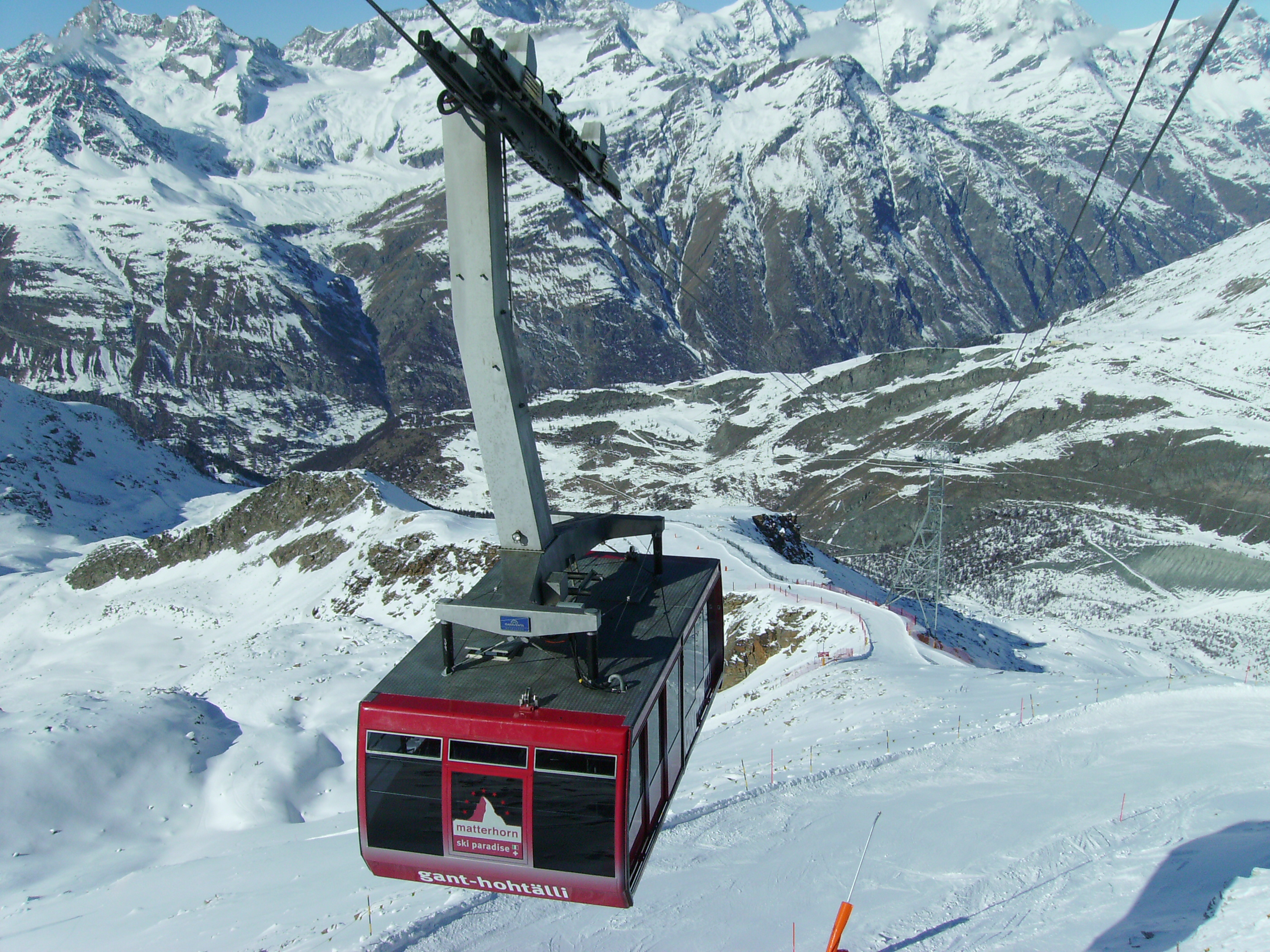 Funivia Höhtalli, Zermatt (Svizzera)